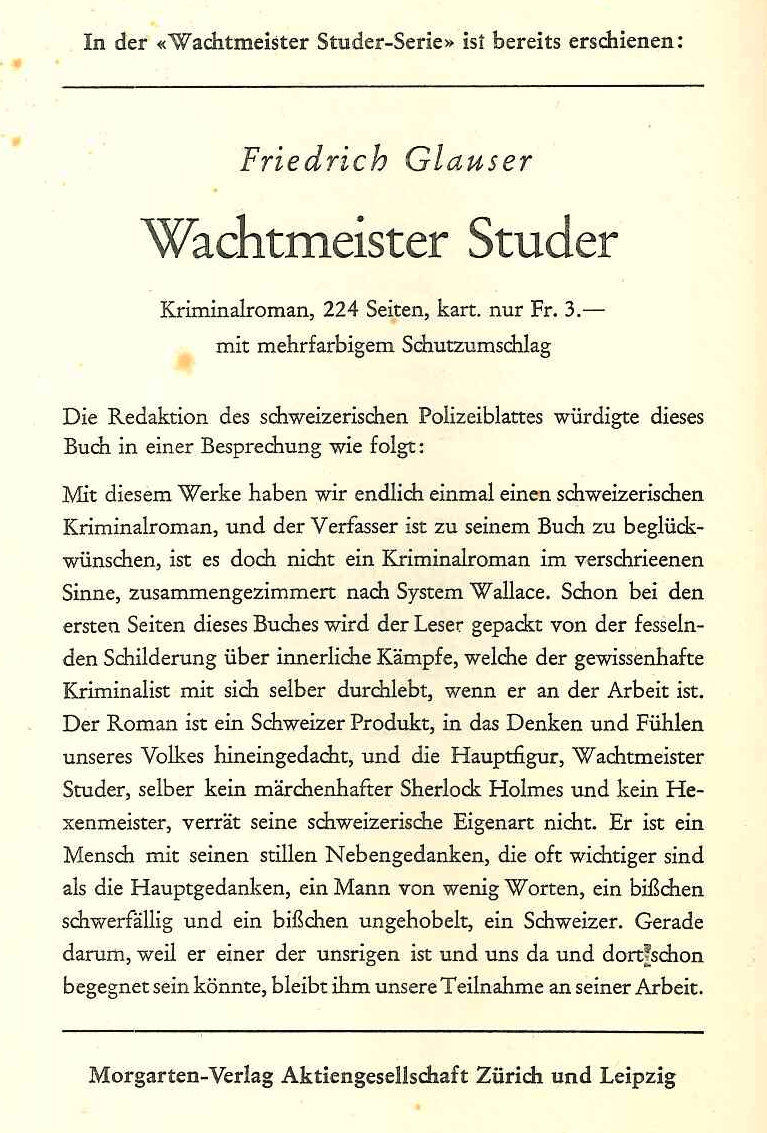 Werbeanzeige für "Wachtmeister Studer" in "Die Fieberkurve". Morgartenverlage, 1938.